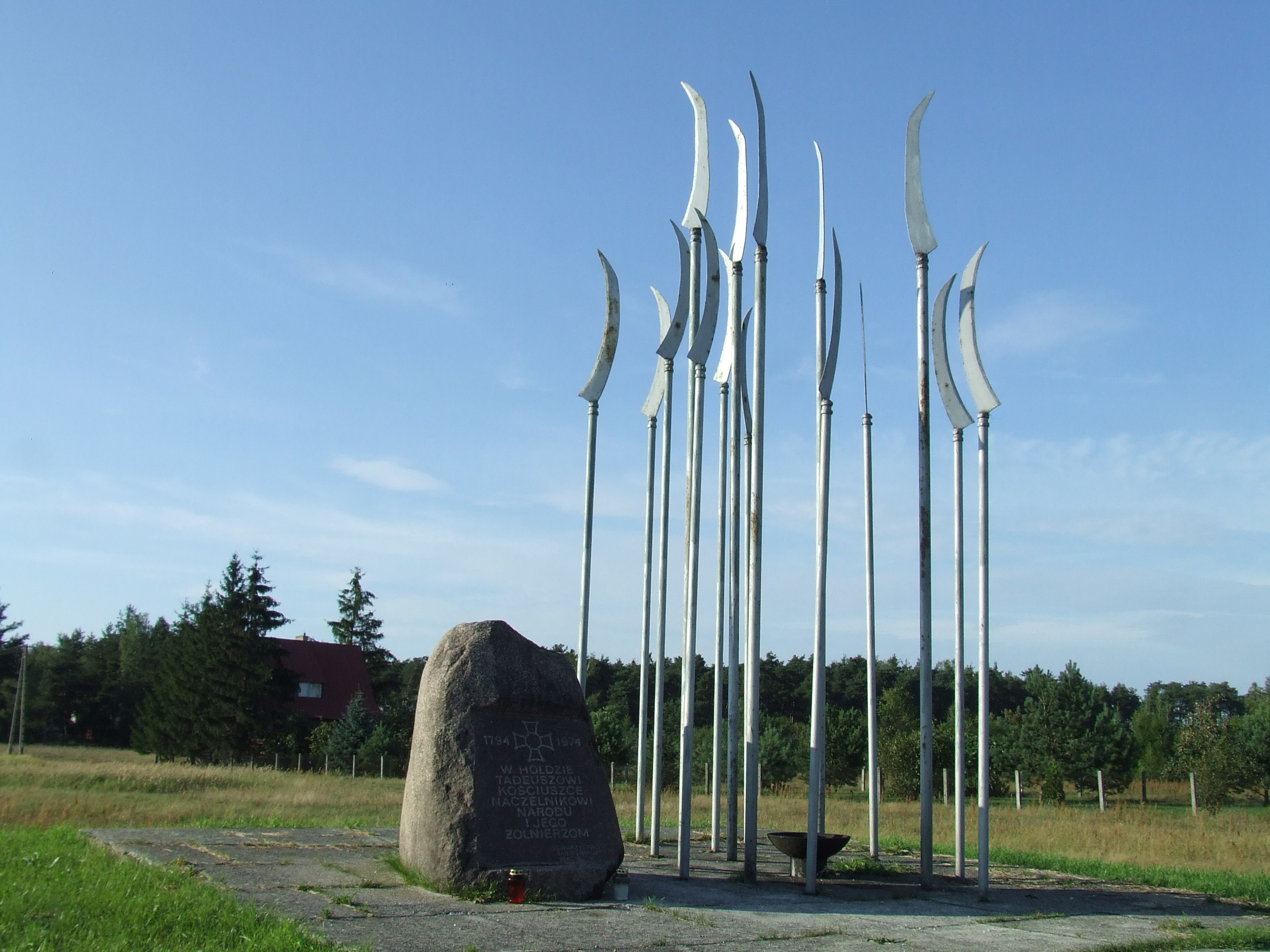 Pole Bitwy pod Maciejowicami z 10 października 1794 r. znajdujące się na terenie miejscowości Podzamcze. Pomnik autorstwa Macieja Krysiaka (zabytek nr A-441 z 28.04.1995)